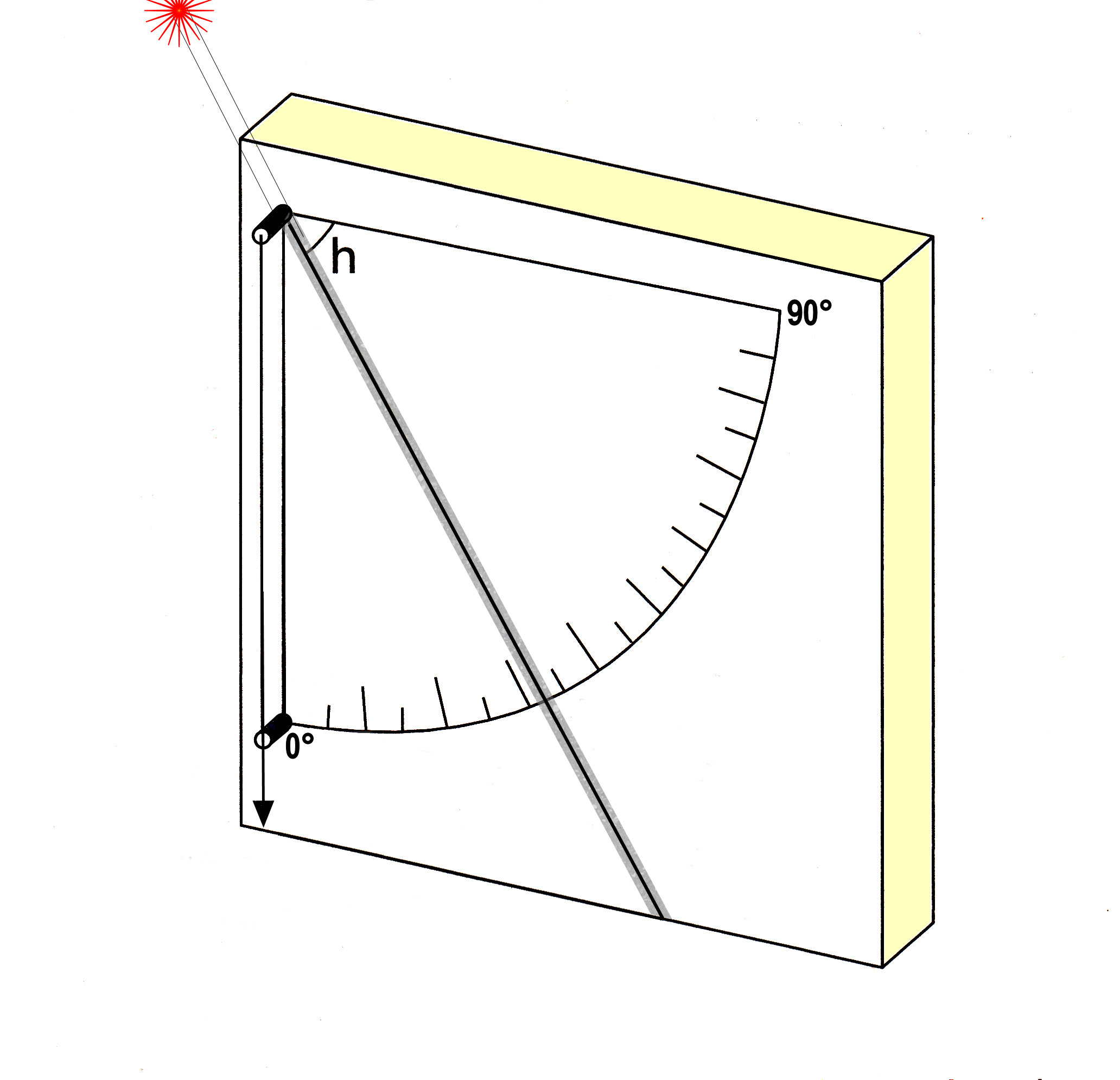 Schéma d'un quadrant en pierre dit aussi socle de Ptolémée, décrit dans l'Almageste.